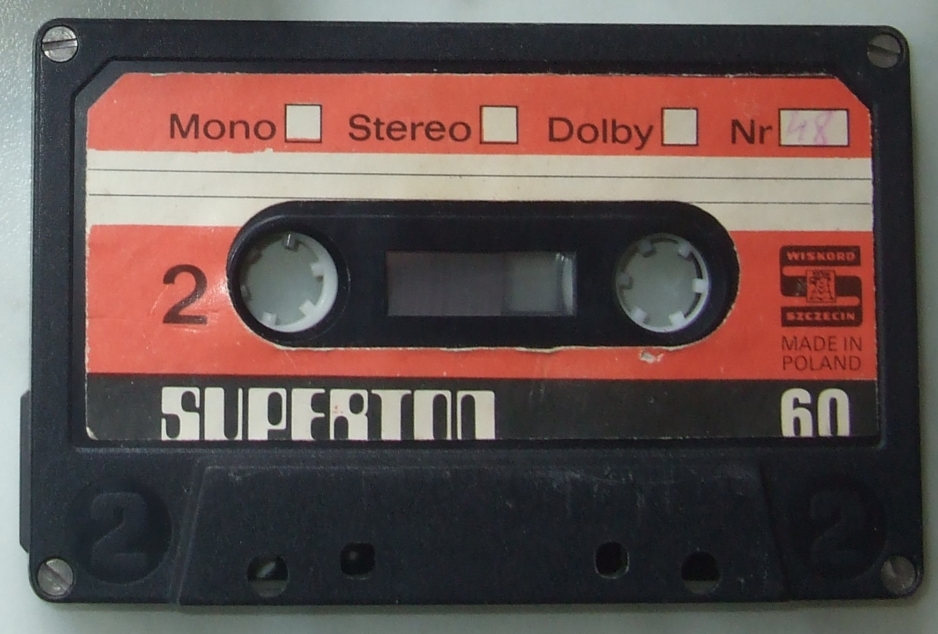 Taśma magnetofonowa w kasecie Superton, Low Noise, 60 minut